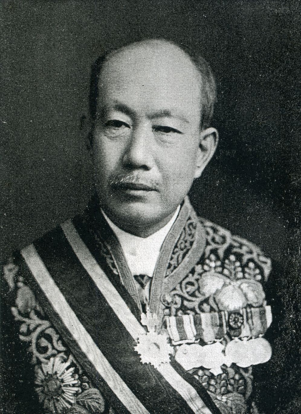 この写真は、俵孫一（1869-1944）の写真です。